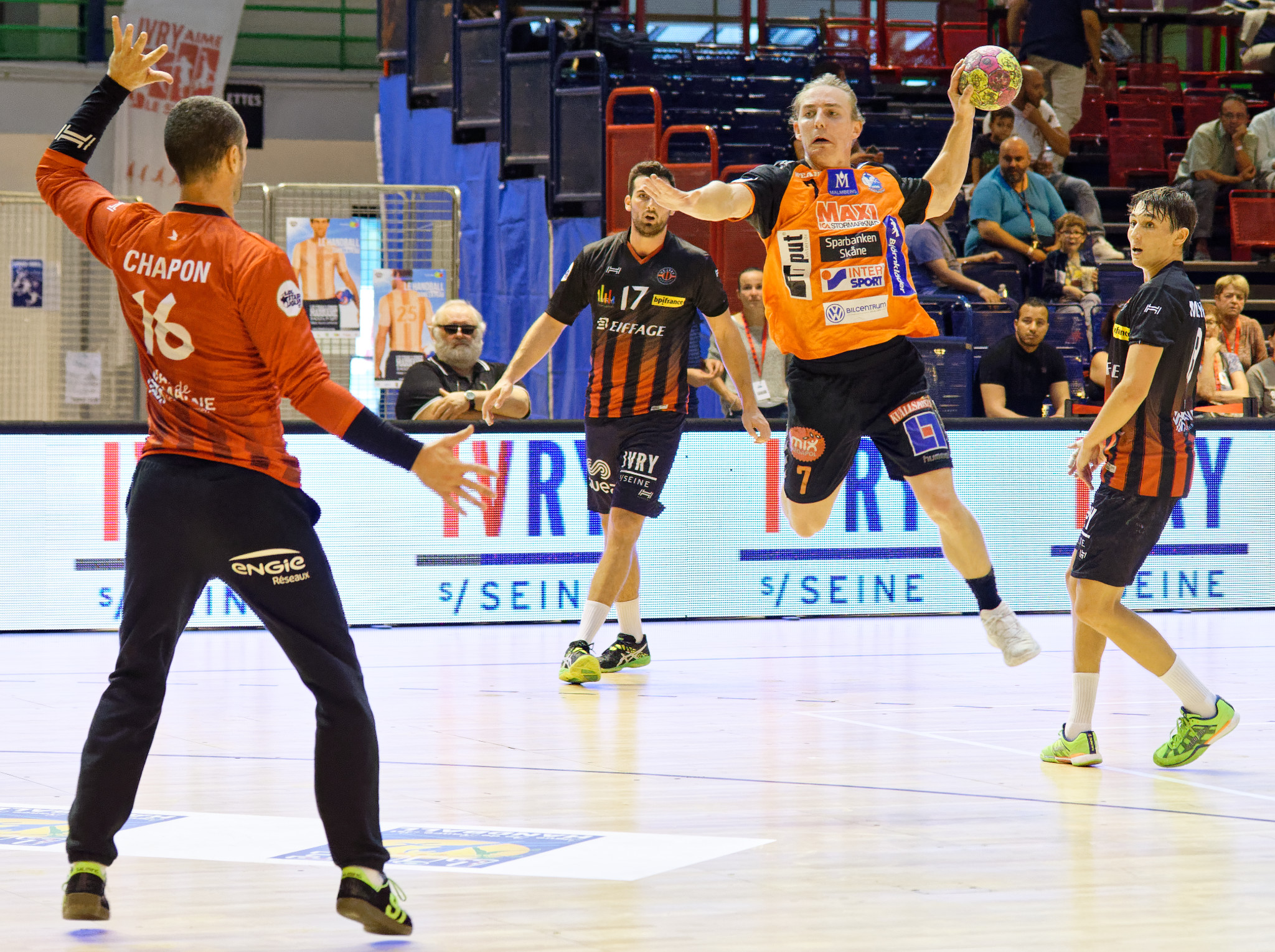 Rencontre du challenge Marrane 2016 entre l'US Ivry et les danois de IFK Kristianstad. A la Halle Carpentier (Paris 13e), le 04 septembre 2016.